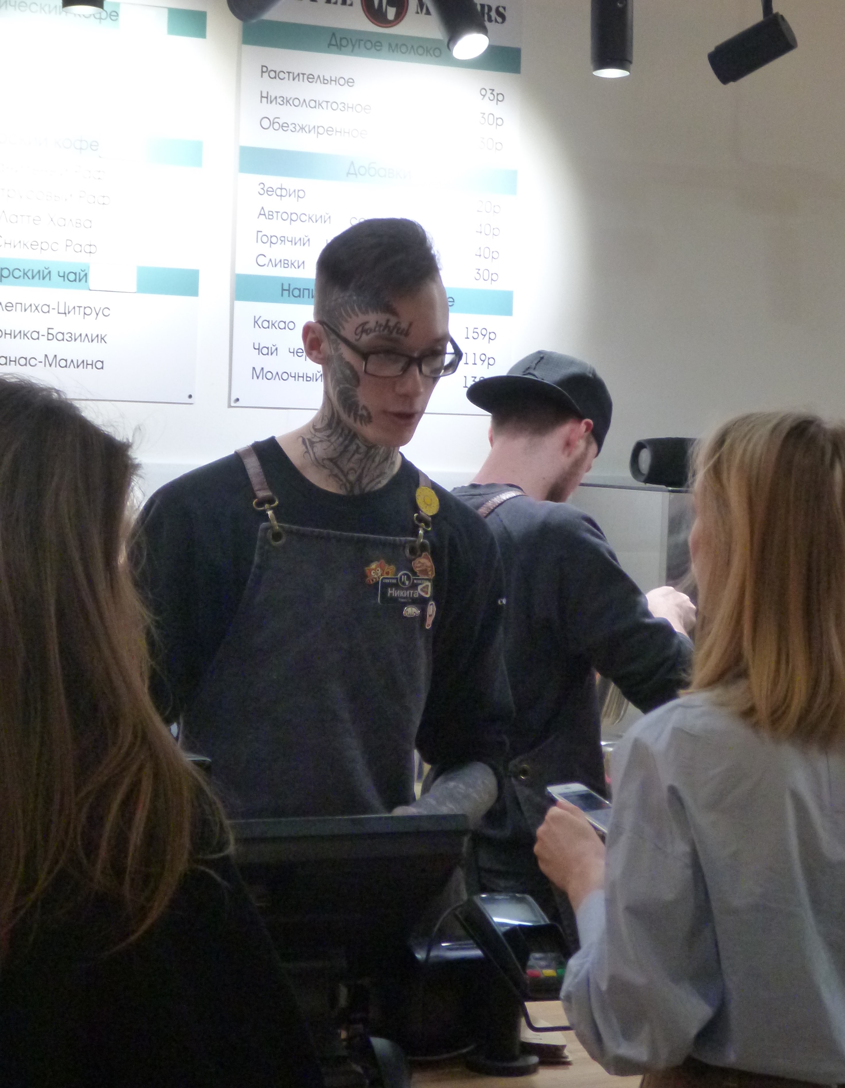 Татуированный продавец в Радуга-парке в закусочной Екатеринбурга, 2020 год